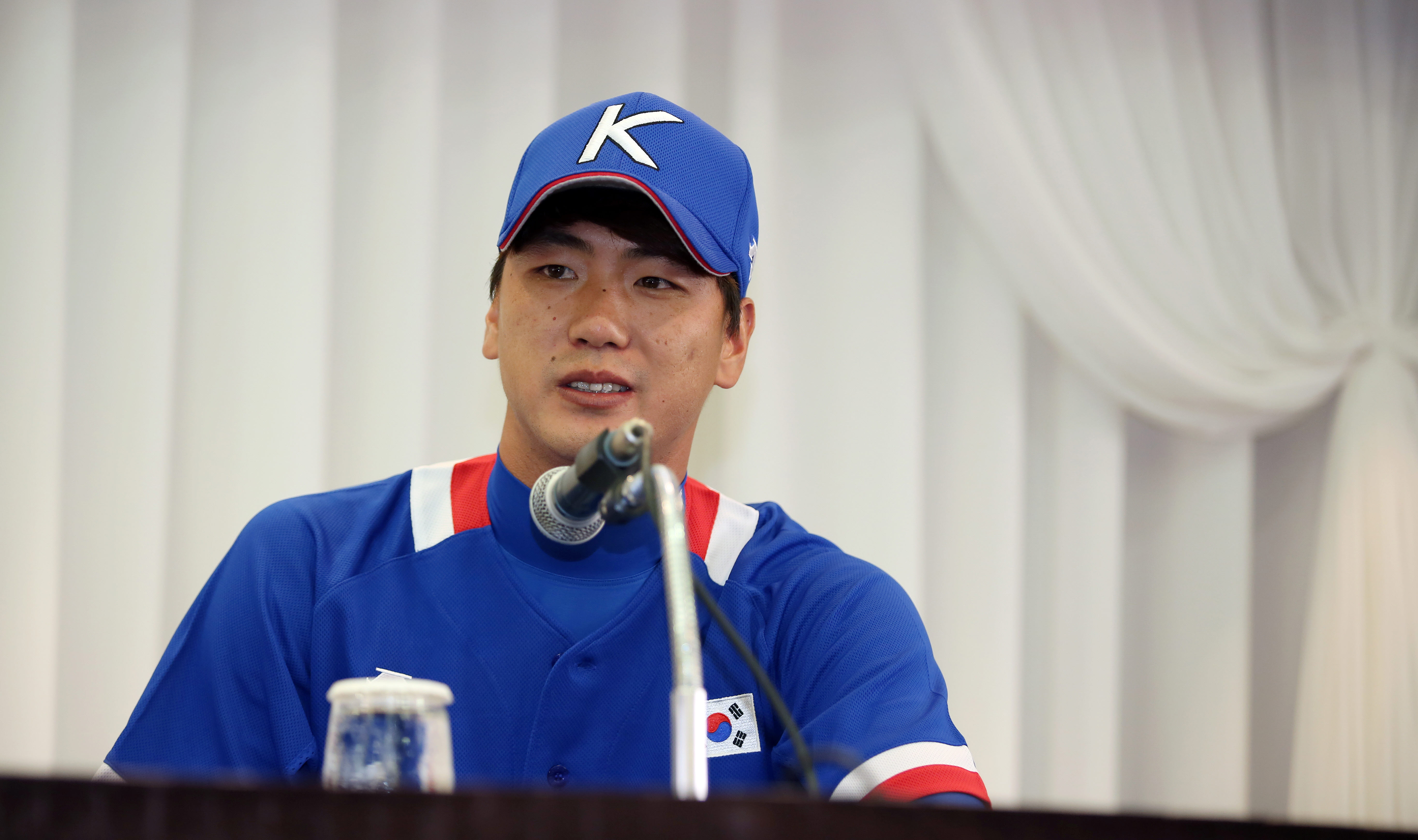 2014 아시안 게임 대한민국 야구 국가대표팀 김광현